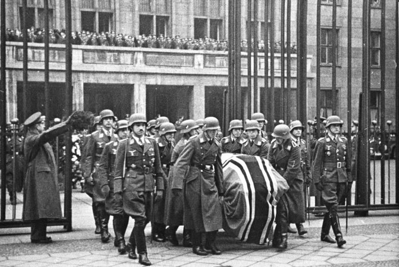 Feierliches Staatsbegräbnis für Generaloberst Udet. Am heutigen 21.11.41, 11 Uhr vormittags fand im Reichsluftfahrtministerium die Trauerfeier für den durch einen Unfall ums Leben gekommenen Generalluftzeugmeister Generaloberst Udet in Gegenwart des Führers und des Reichsmarschalls Generalfeldmarschall Göring statt. UBz: Die Ritterkreuzträger begleiten die Lafette, geführt von Oberstleutnant Galland.